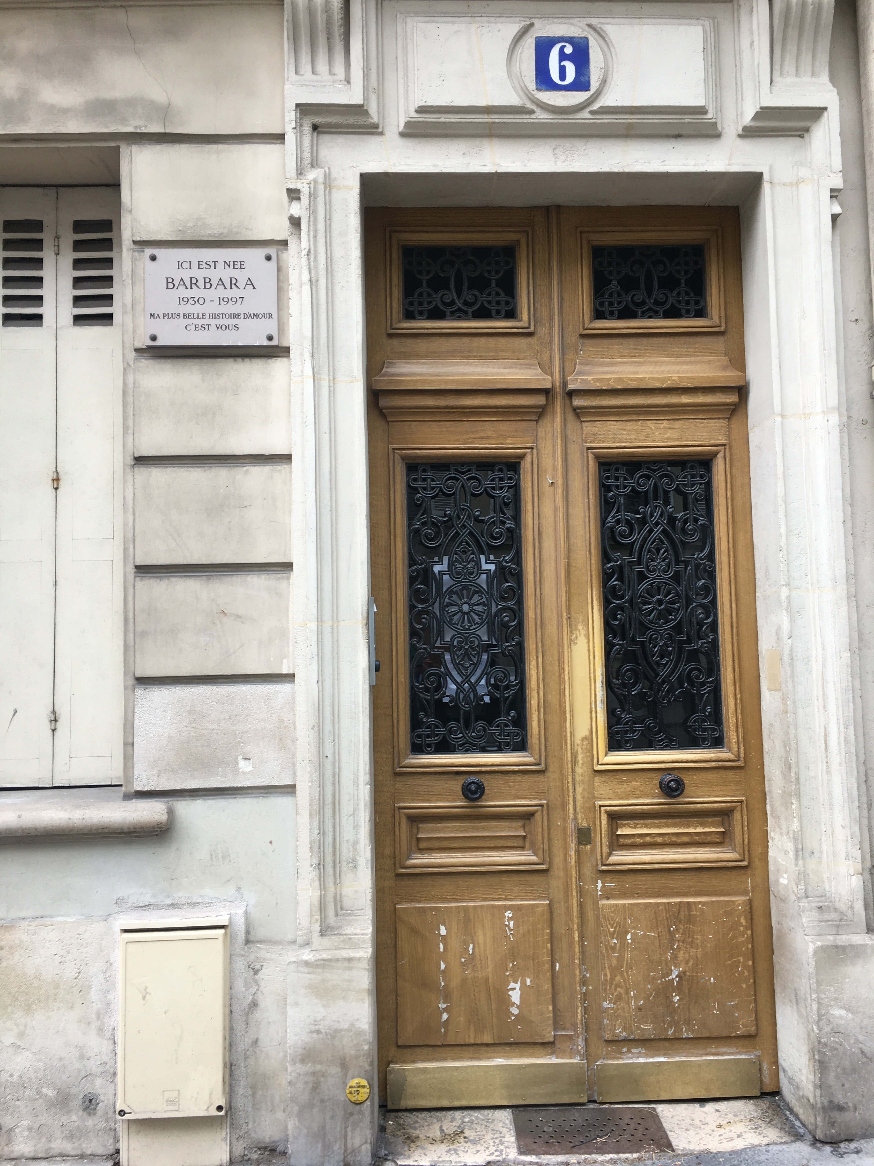 Paris, quartier des Batignolles dans le dix-septième arrondissement, 6 rue Brochant immeuble où est née Barbara. Puis elle est allée vivre chez sa grand-mère, rue Nollet.